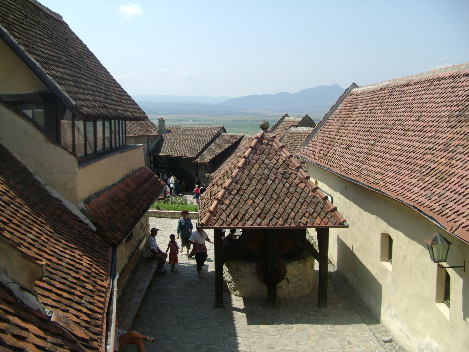 Vedere peste fantana din Cetatea Rasnov, Rasnov, Judetul Brasov. Vara 2009